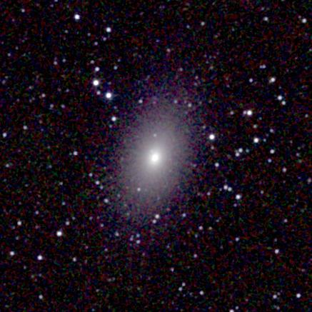 Galaxy NGC 4976